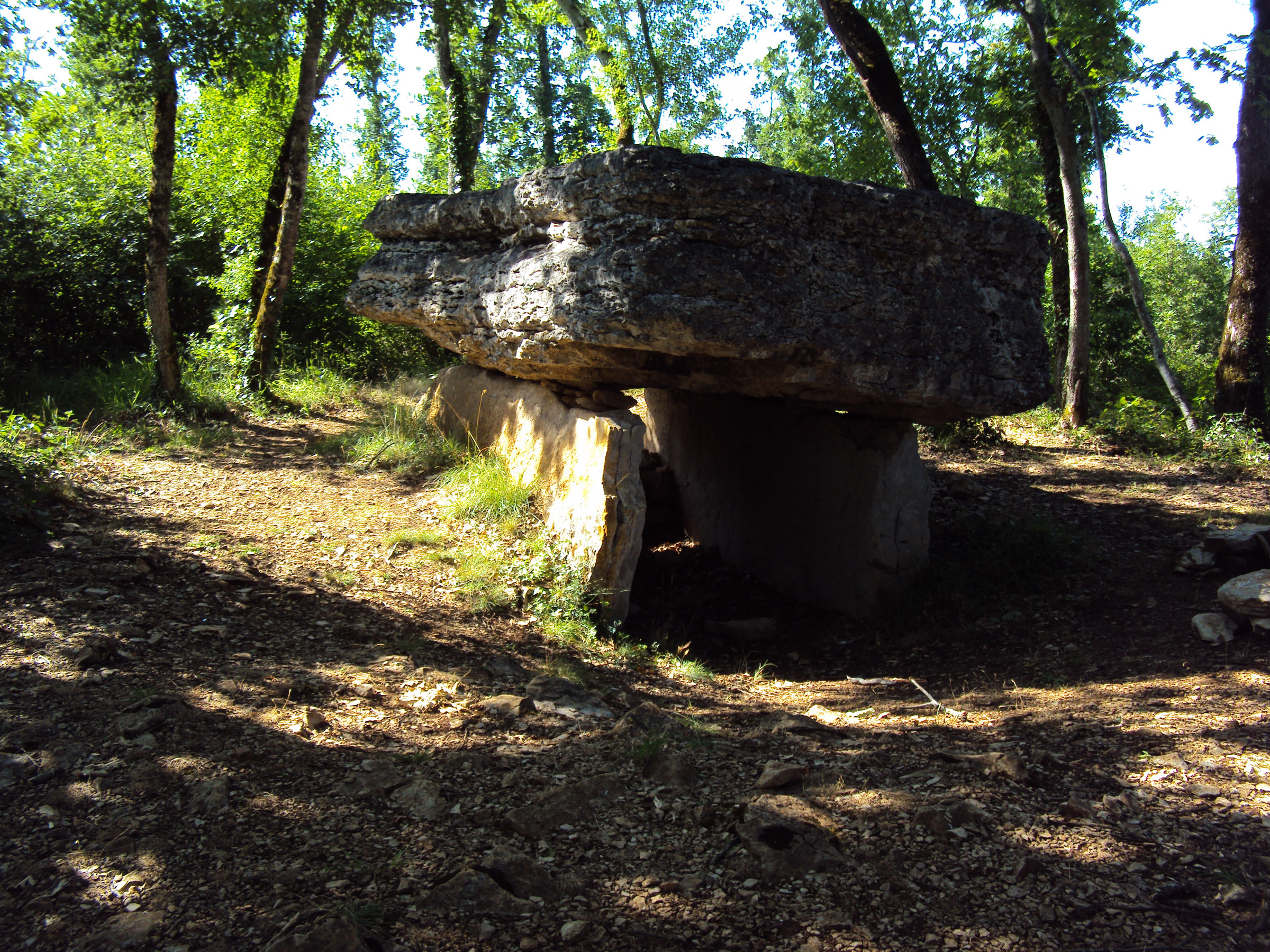 Dolmen du Lac d'Aurie dit du "Pech Lapeyre" près de Limogne en Quercy (04) Ænglisc: The Dolmen of the Lac d'Aurie near the village of Limogne en Quercy (04)